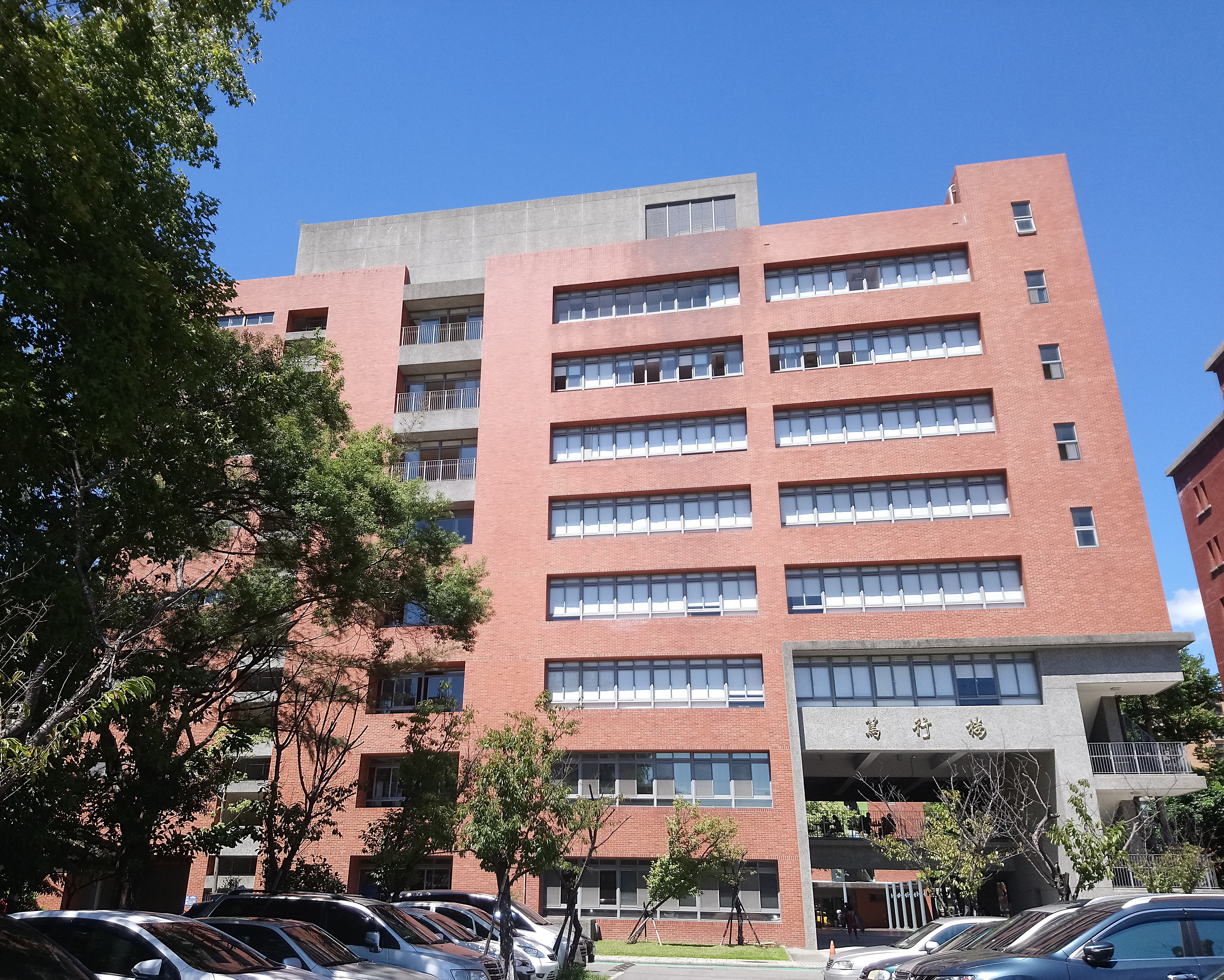 國立臺北教育大學篤行樓,臺北市大安區大安區臥龍次分區臥龍里